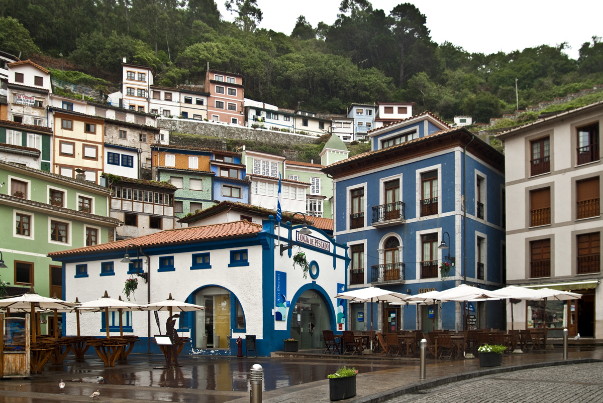 Lonja de pescado de Cudillero